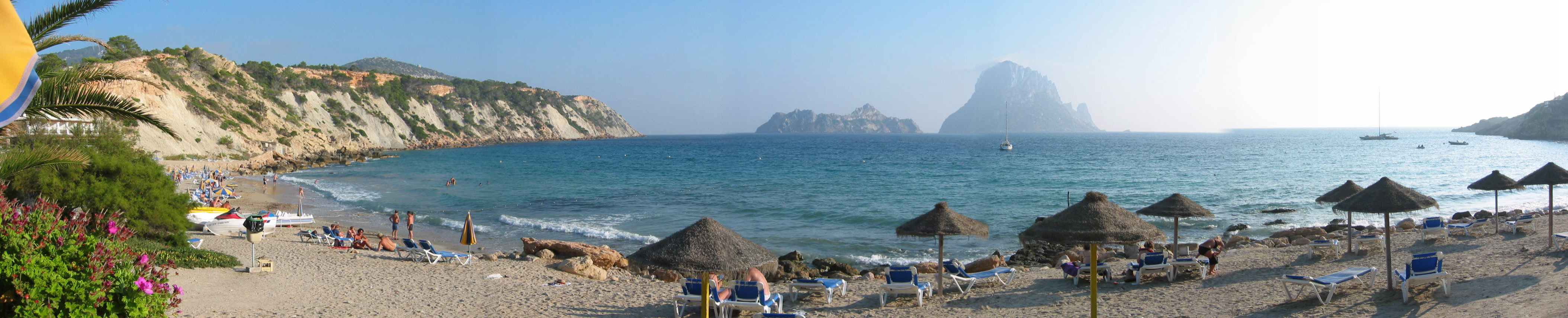 Cala d'Hort auf Ibiza mit Blick aus die Es vedra.